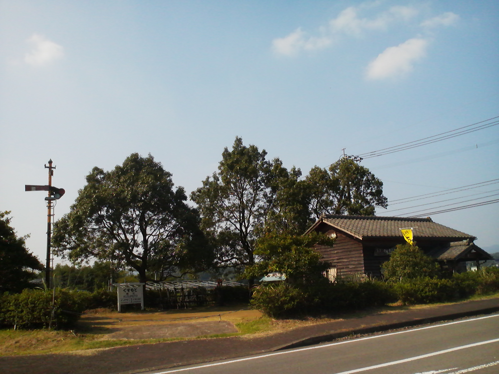 楠元駅跡にある鉄道公園などの外観。